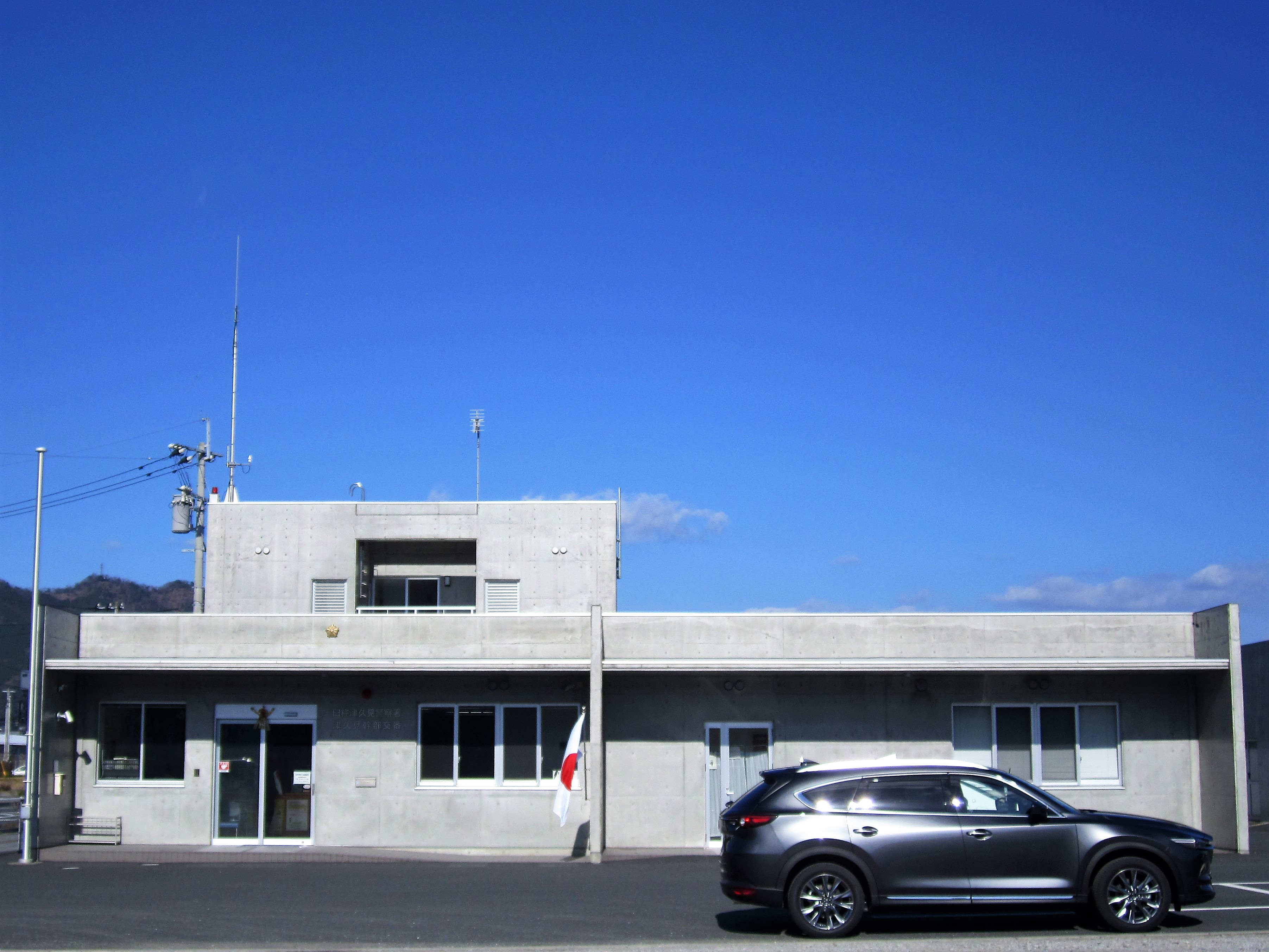 臼杵津久見警察署 津久見幹部交番（津久見市中央町） Canon PowerShot A2200